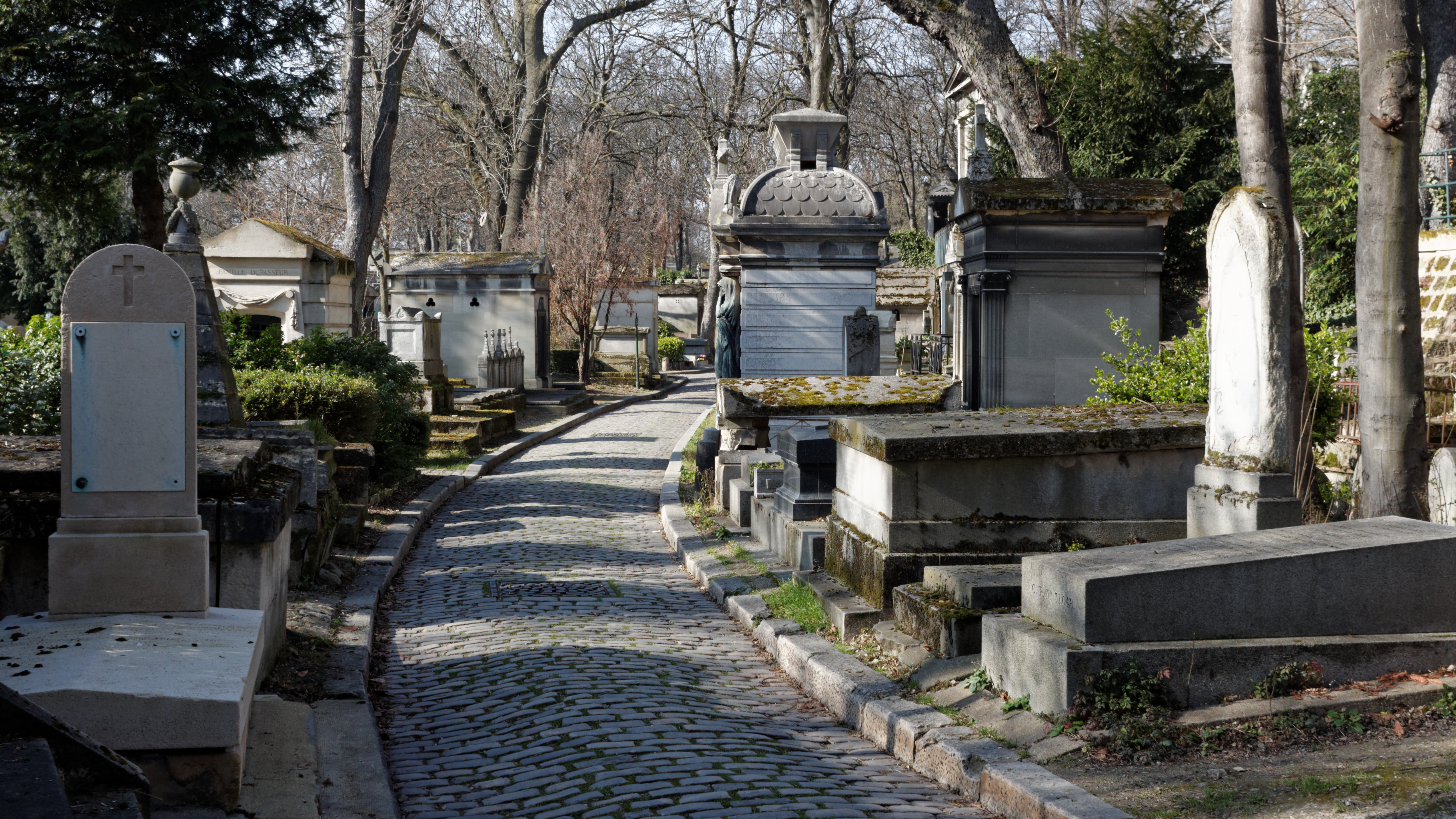 Vue du chemin de la Guérite,au cimetière du Père-Lachaise.